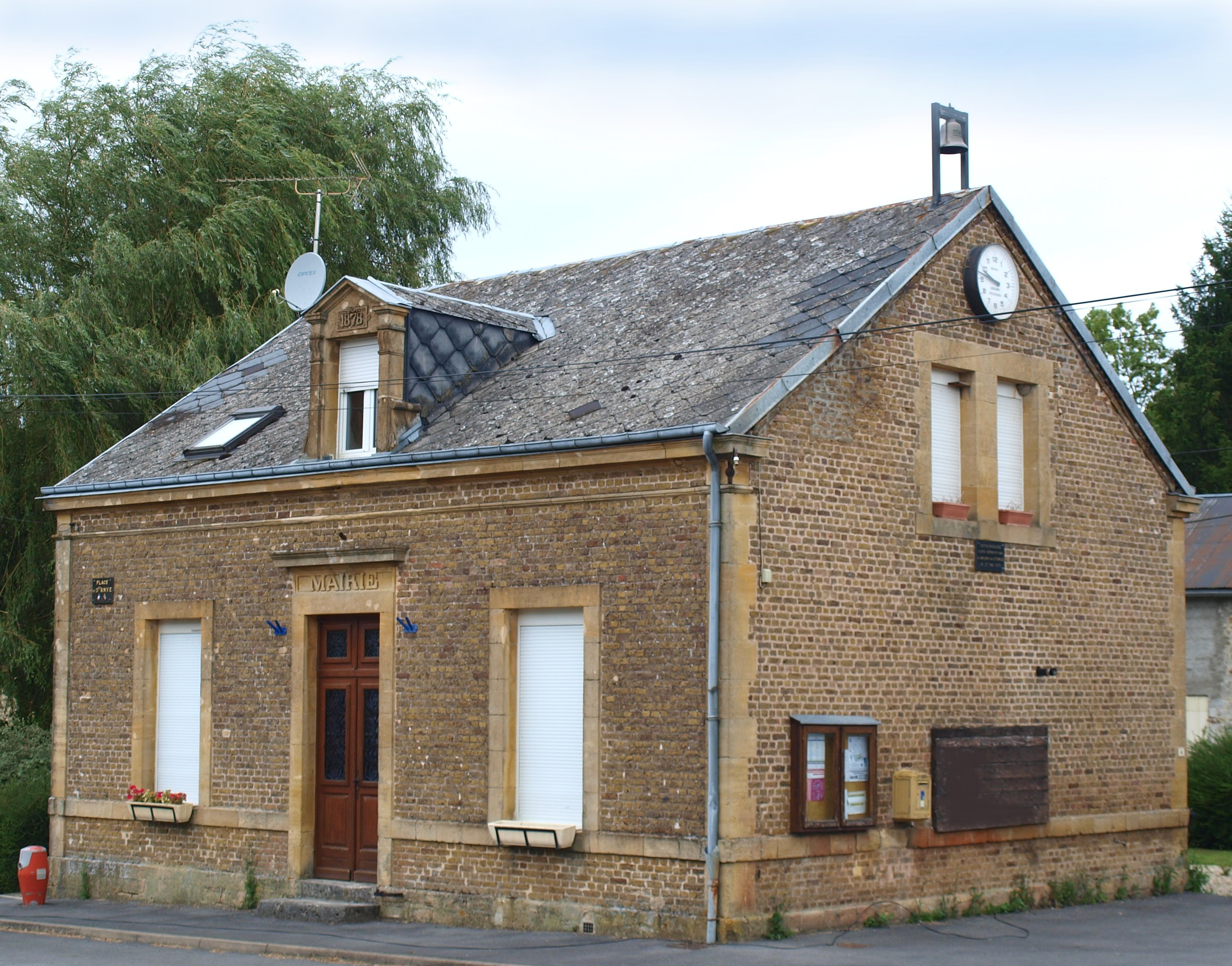 Noirval (Ardennes, France) ; mairie